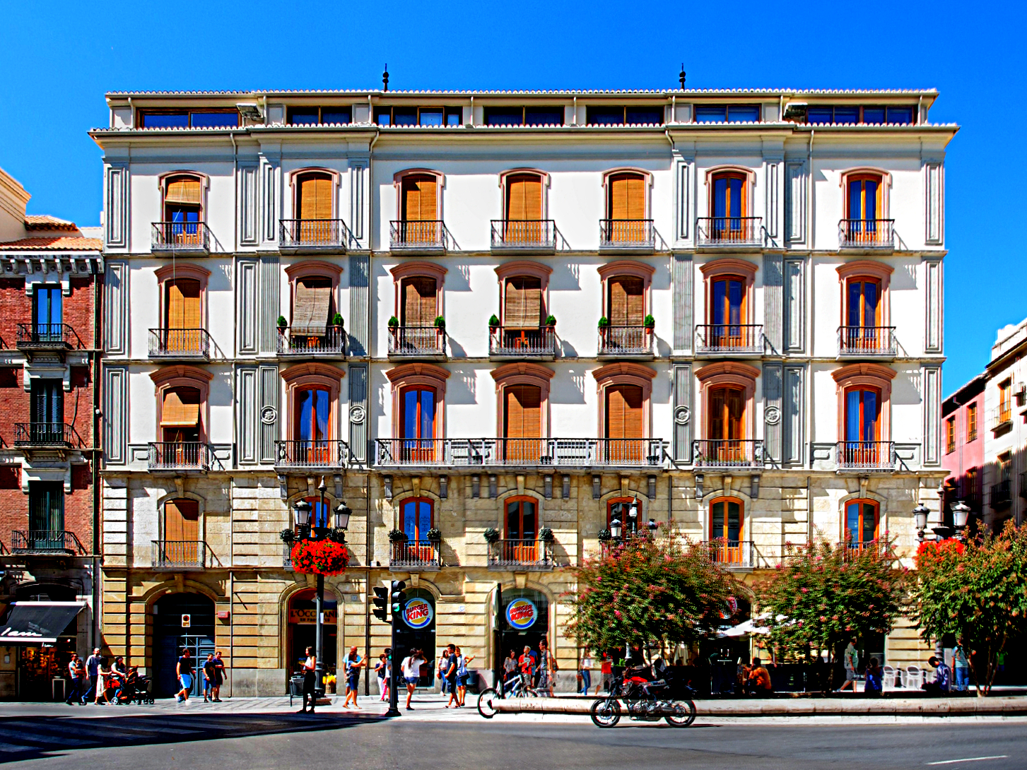 Casa Número 4 de Puerta Real